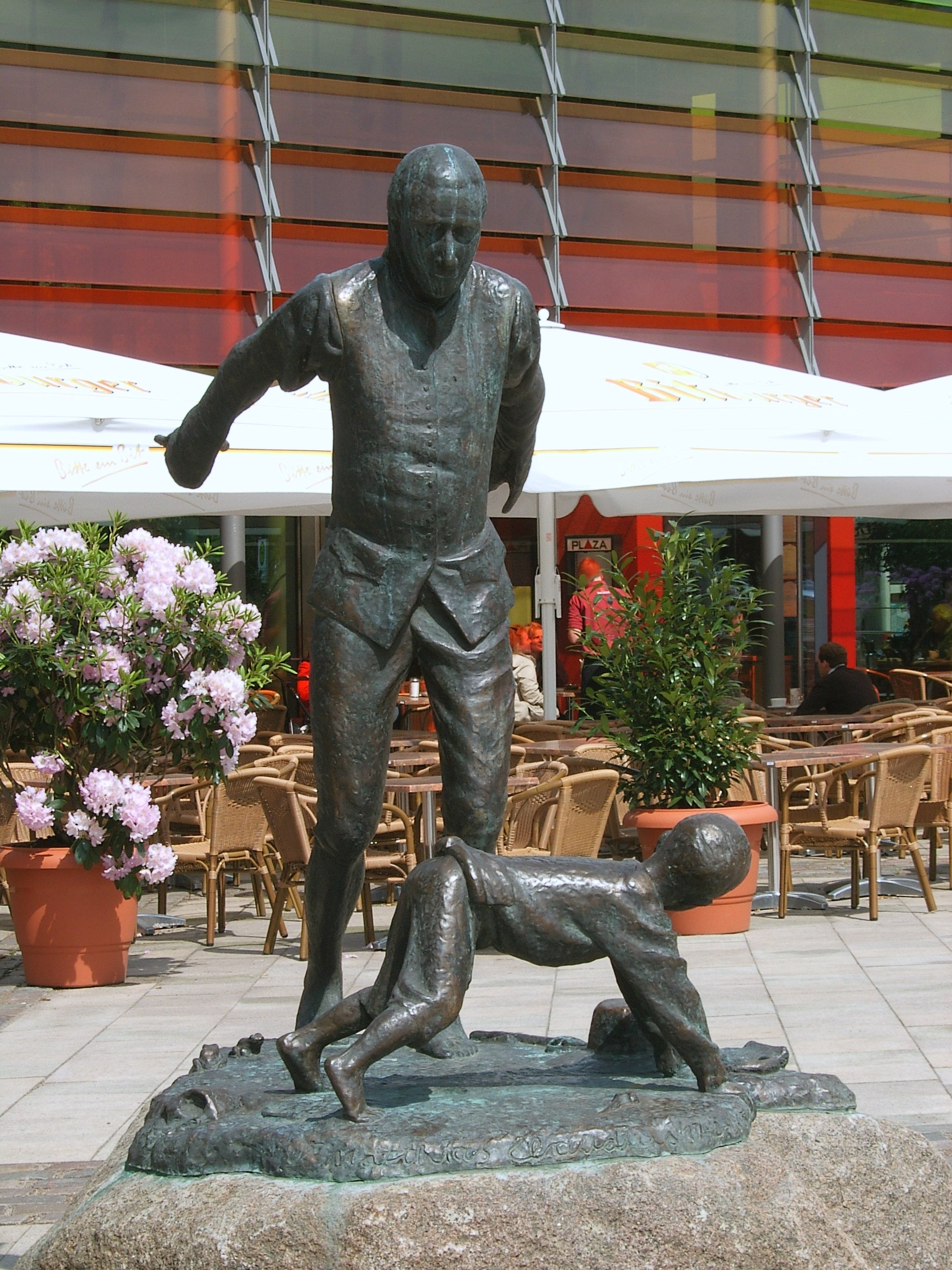 Skulptur Der Freudensprung auf dem Wandsbeker Markt. Die Skulptur stellt den Hamburger Dichter und "Wandsbeker Boten" Matthias Claudius beim Sprung über einen seiner Söhne; ein altes Ritual aus dem 18. Jahrhundert, das bei der Geburt eines weiteren Kindes vollführt wurde und Glück bringen sollte. - Andere Version: File:Hh-wandsbekmarkt-sprung2.jpg